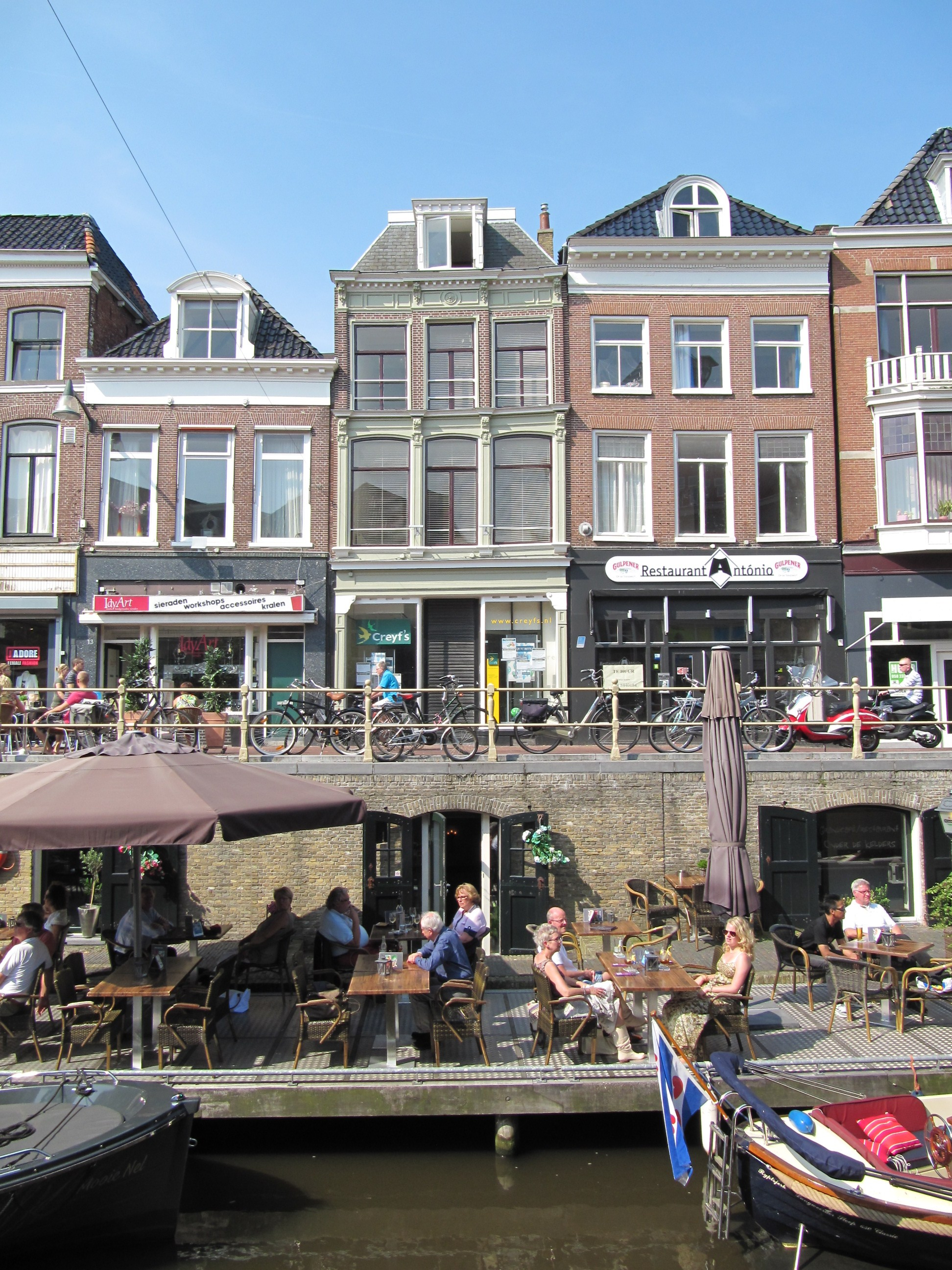 RM24233 Leeuwarden - Kelders 15.jpg